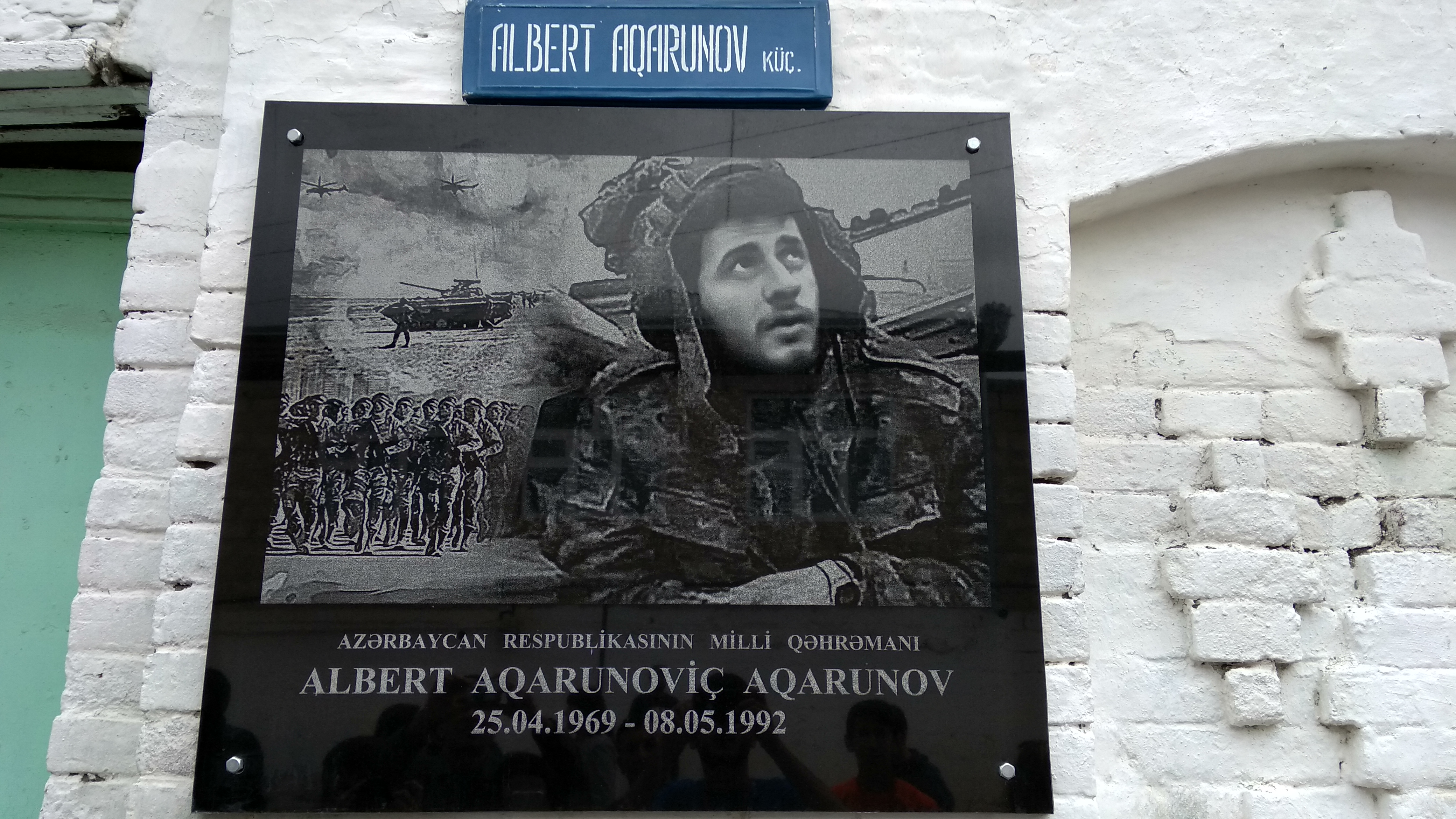 Quba rayonunun Qırmızı qəsəbəsində Azərbaycanın Milli Qəhrəmanı Albert Aqarunovun xatirə lövhəsi.